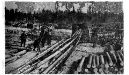 работа в лесу